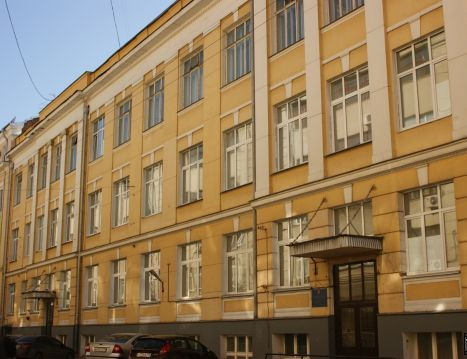 Вид школы с Б.Трехсвятительского переулка